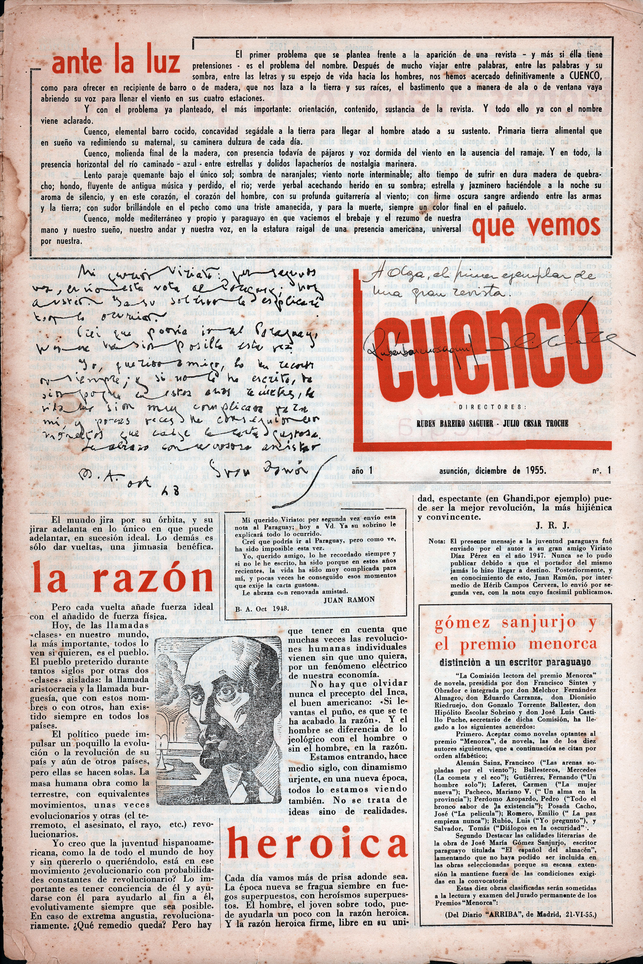 Tapa del número 1 de la revista Alcor-Cuenco